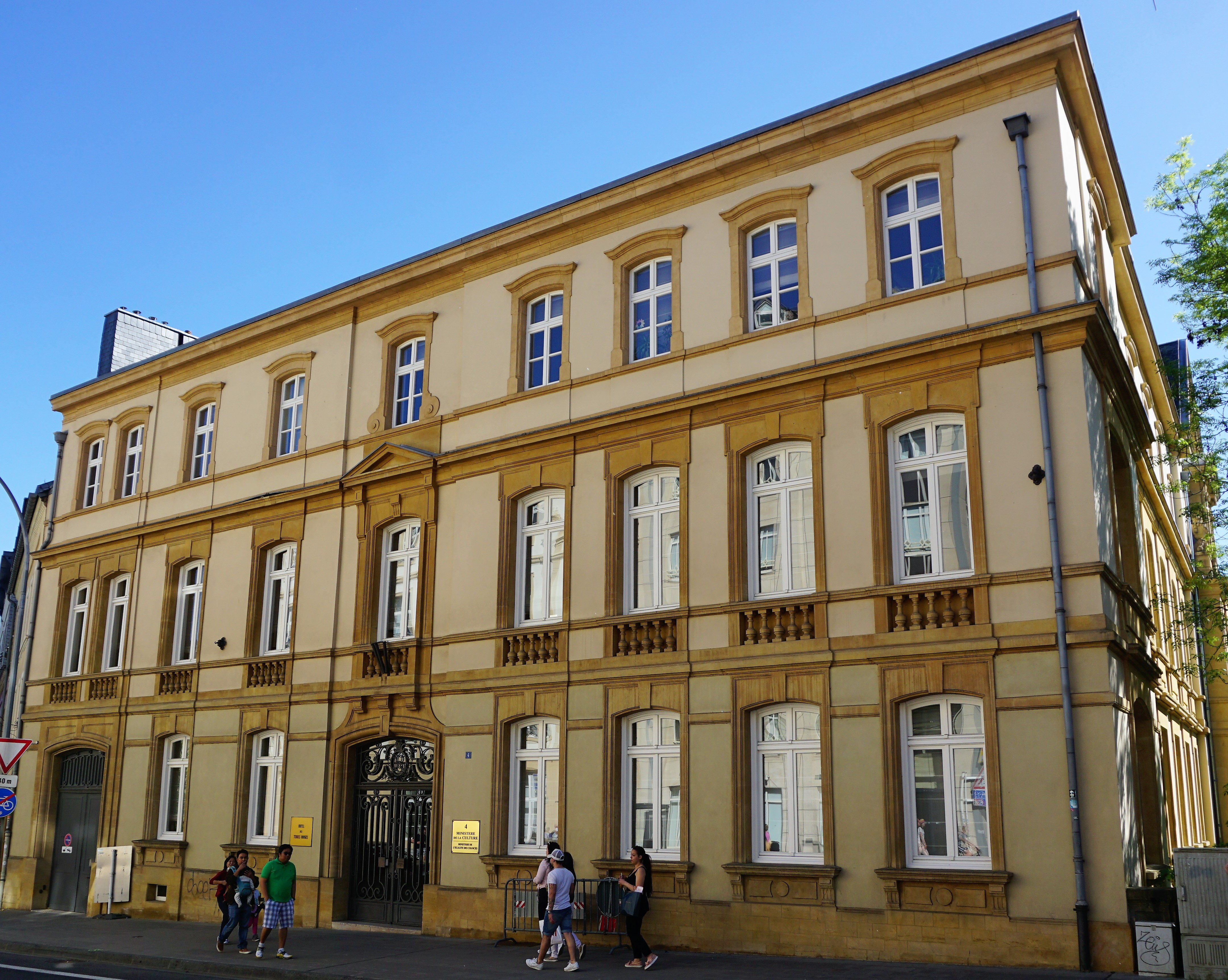 Luxembourg, Hôtel des Terres Rouges, boulevard F.-D. Roosevelt.